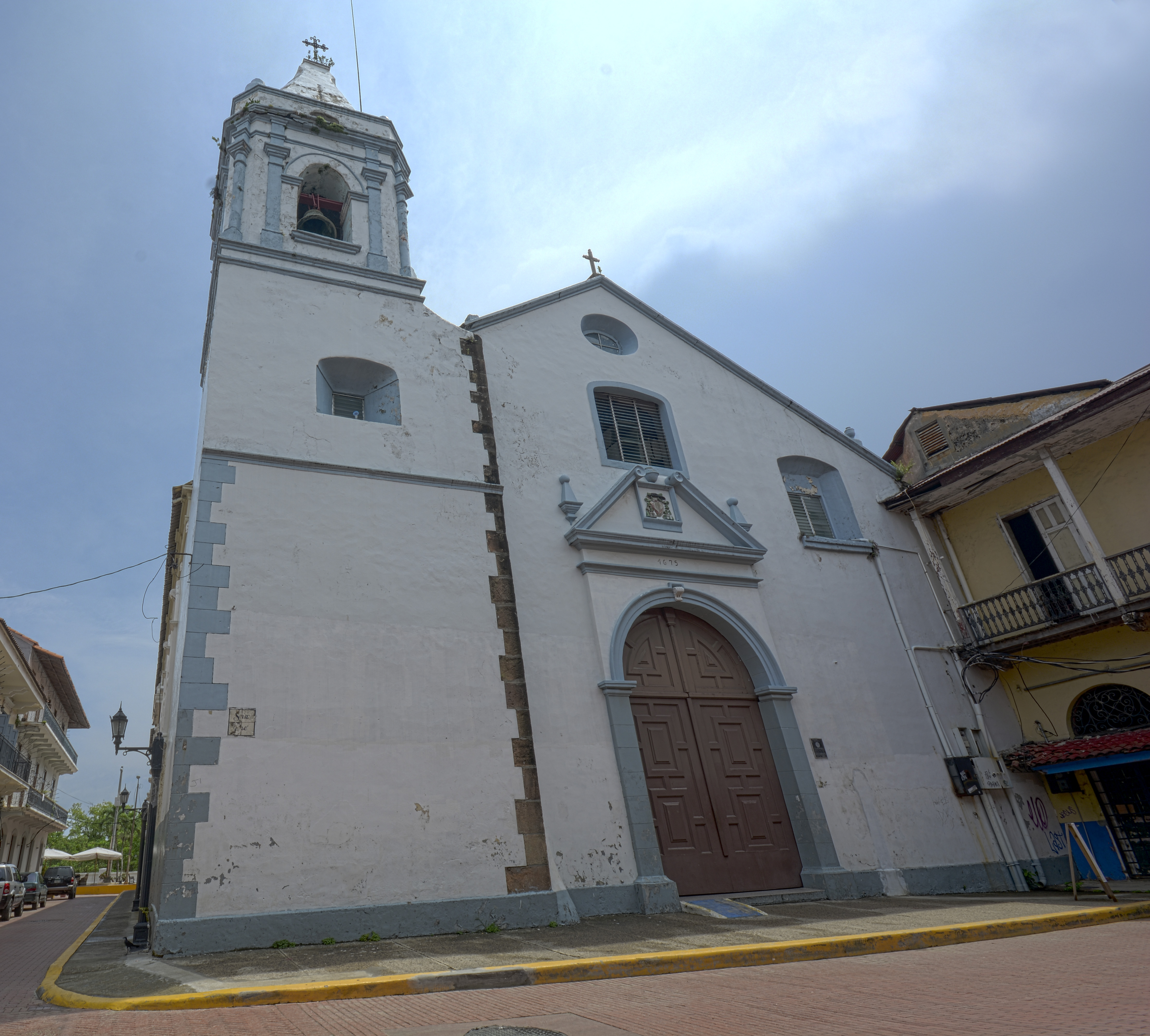 Iglesia de San Jose